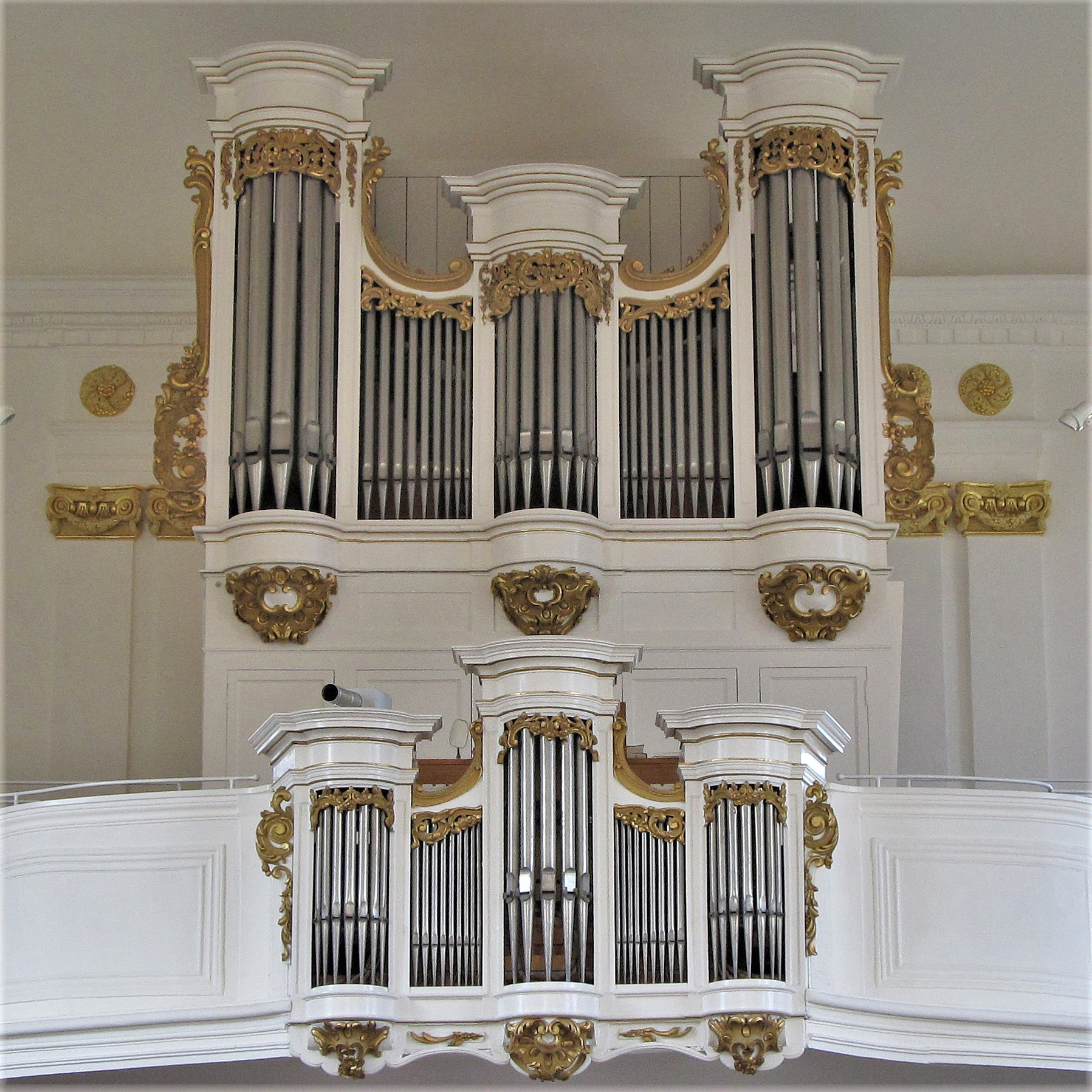 Orgelprospekt der Schlosskirche Blieskastel, Saarland